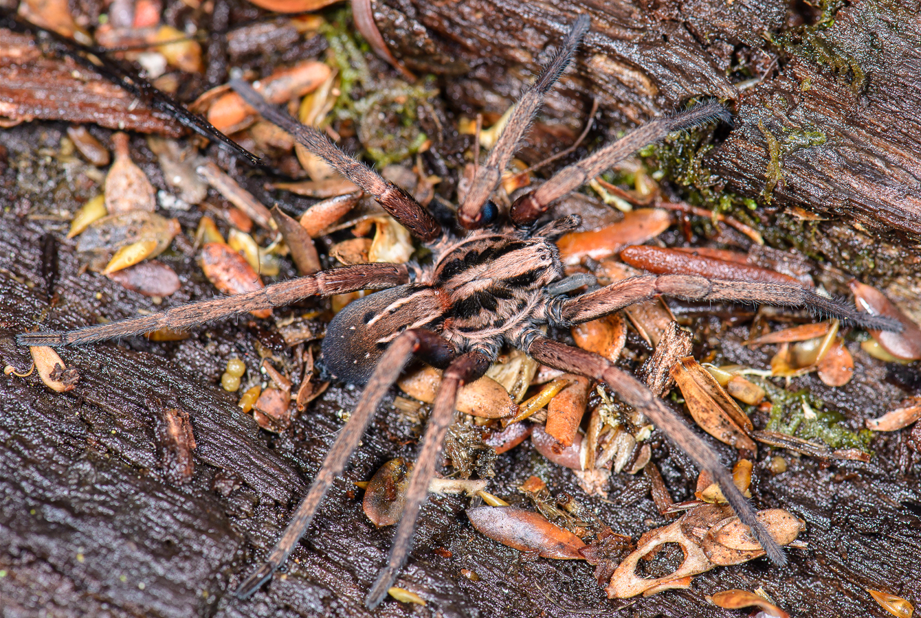 Miturga albopunctata, adult male (F Miturgidae)